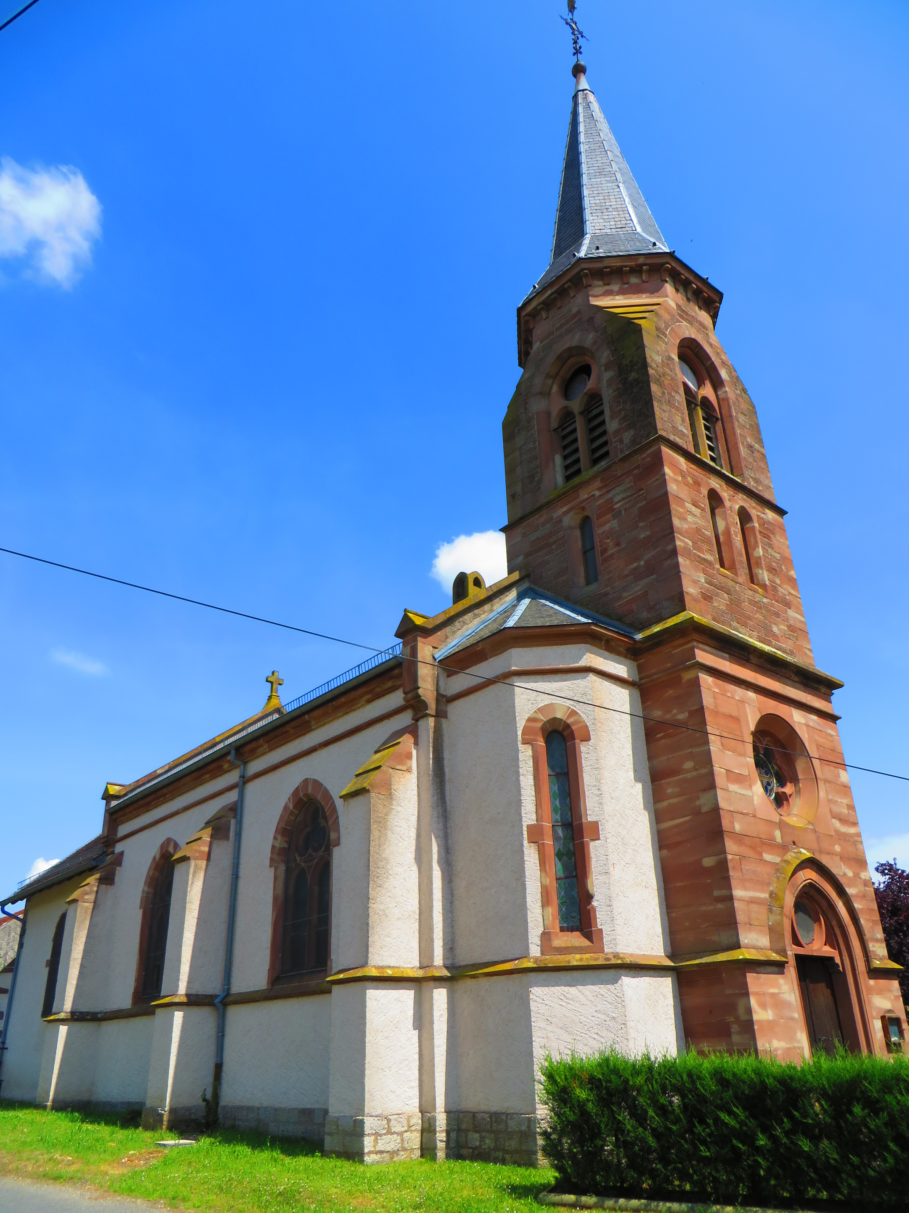 Aspach eglise moselle 57